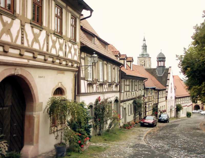 Altstadt von Königsberg in Franken. Salzmarkt mit "Regiomontanushaus". Eigene Aufnahme, 2003